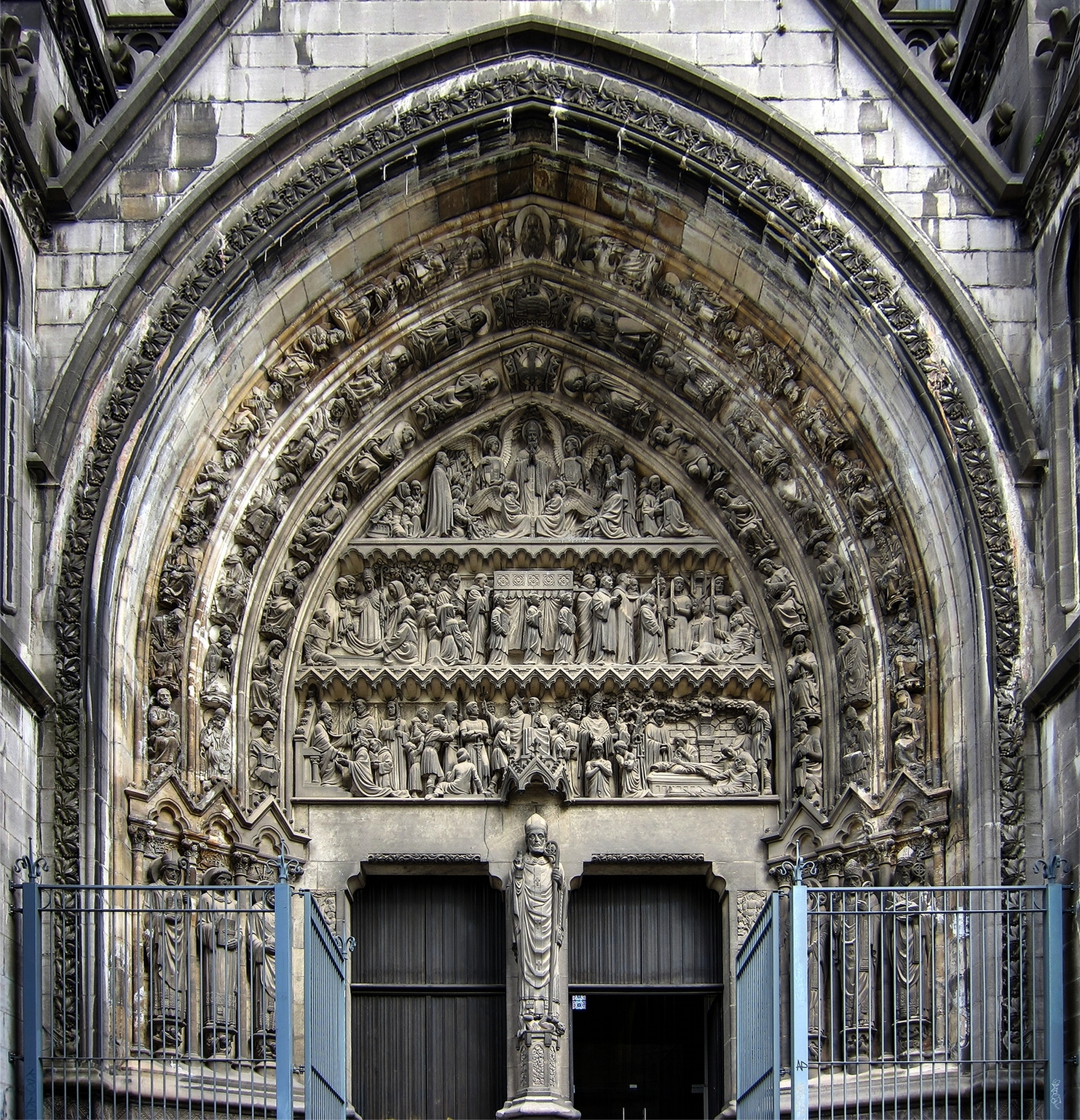 Portail sud de la cathédrale Notre-Dame de la Treille à Lille.